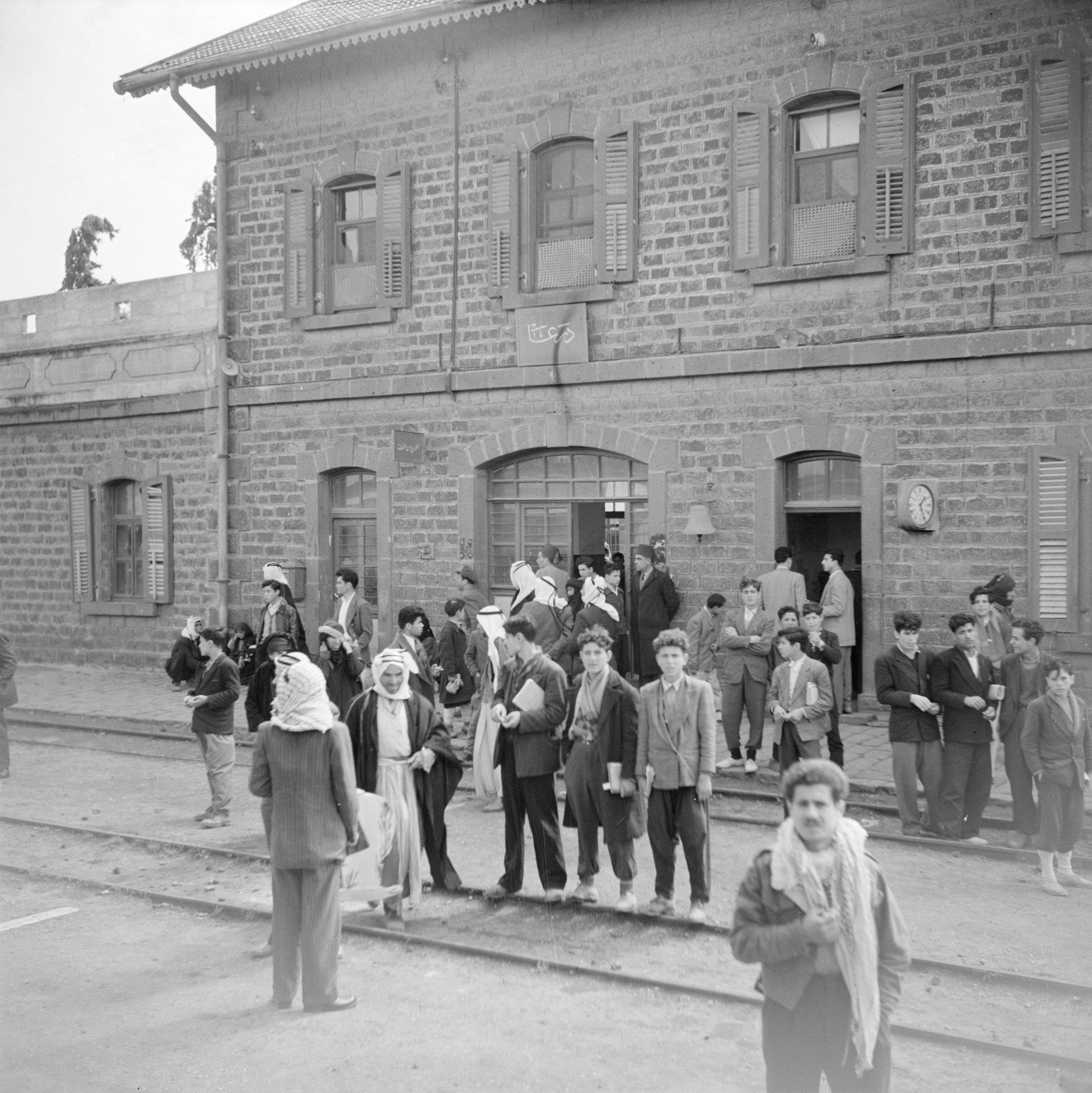 Collectie / Archief : Fotocollectie Van de Poll Reportage / Serie : Midden-Oosten 1950-1955: Treinreis van Amman naar Damascus Beschrijving : Wachtende reizigers op het station van de Jordaanse grensplaats Dera Datum : 1950 Locatie : Syria Trefwoorden : grenzen, reizigers, stations Fotograaf : Poll, Willem van de Auteursrechthebbende : Nationaal Archief Materiaalsoort : Negatief (zwart/wit) Nummer archiefinventaris : bekijk toegang 2.24.14.02 Bestanddeelnummer : 255-5783